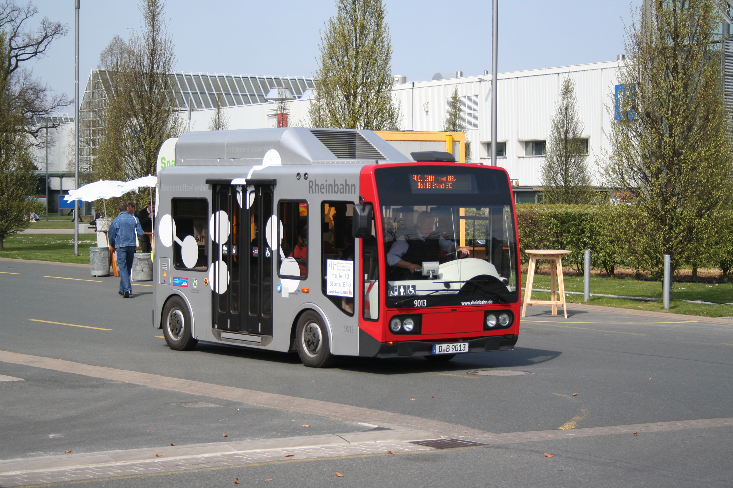 Der Rheinbahnbus auf der Hannover Messe 2008